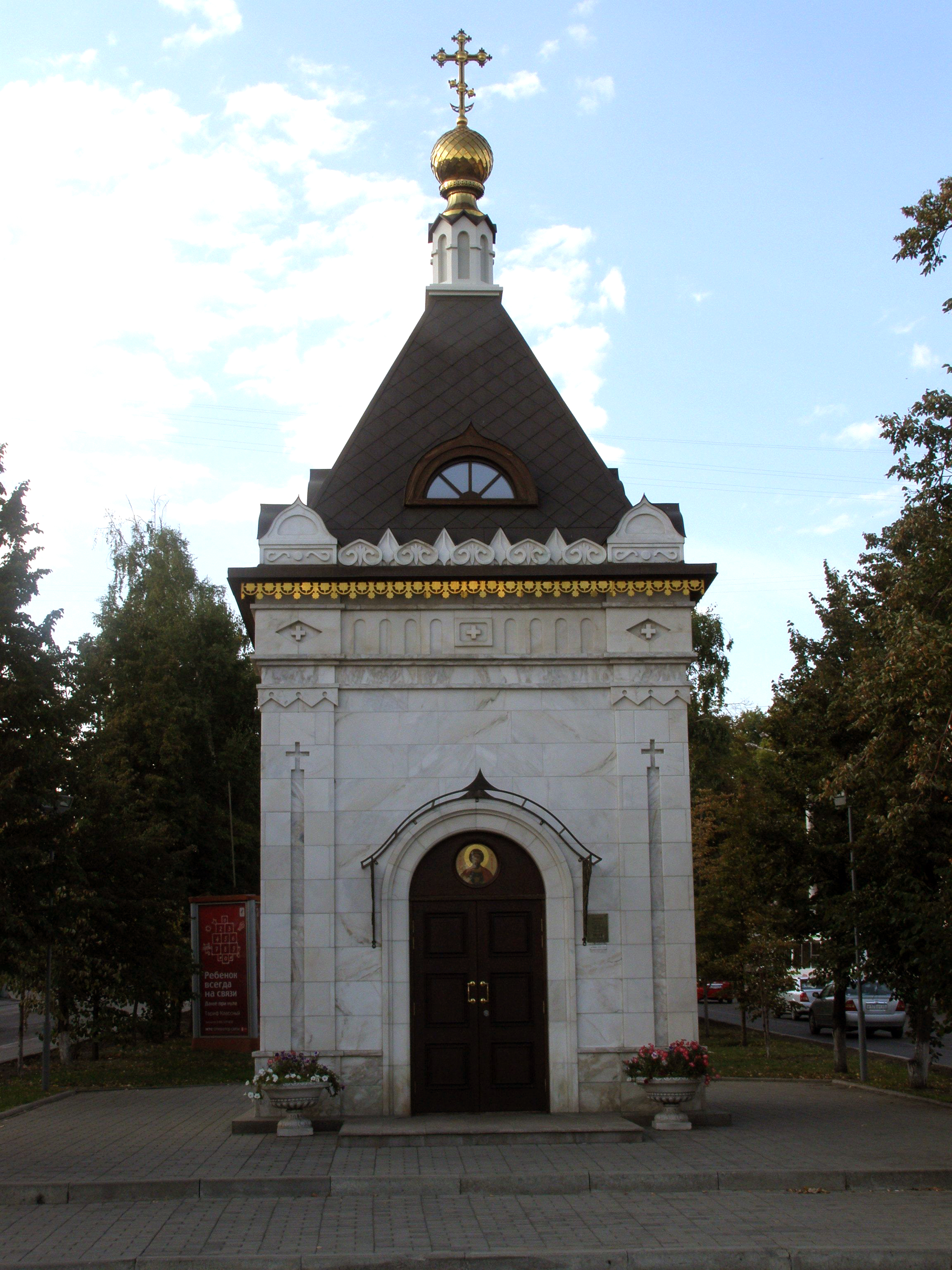 Часовня Александра Невского (Барнаул)